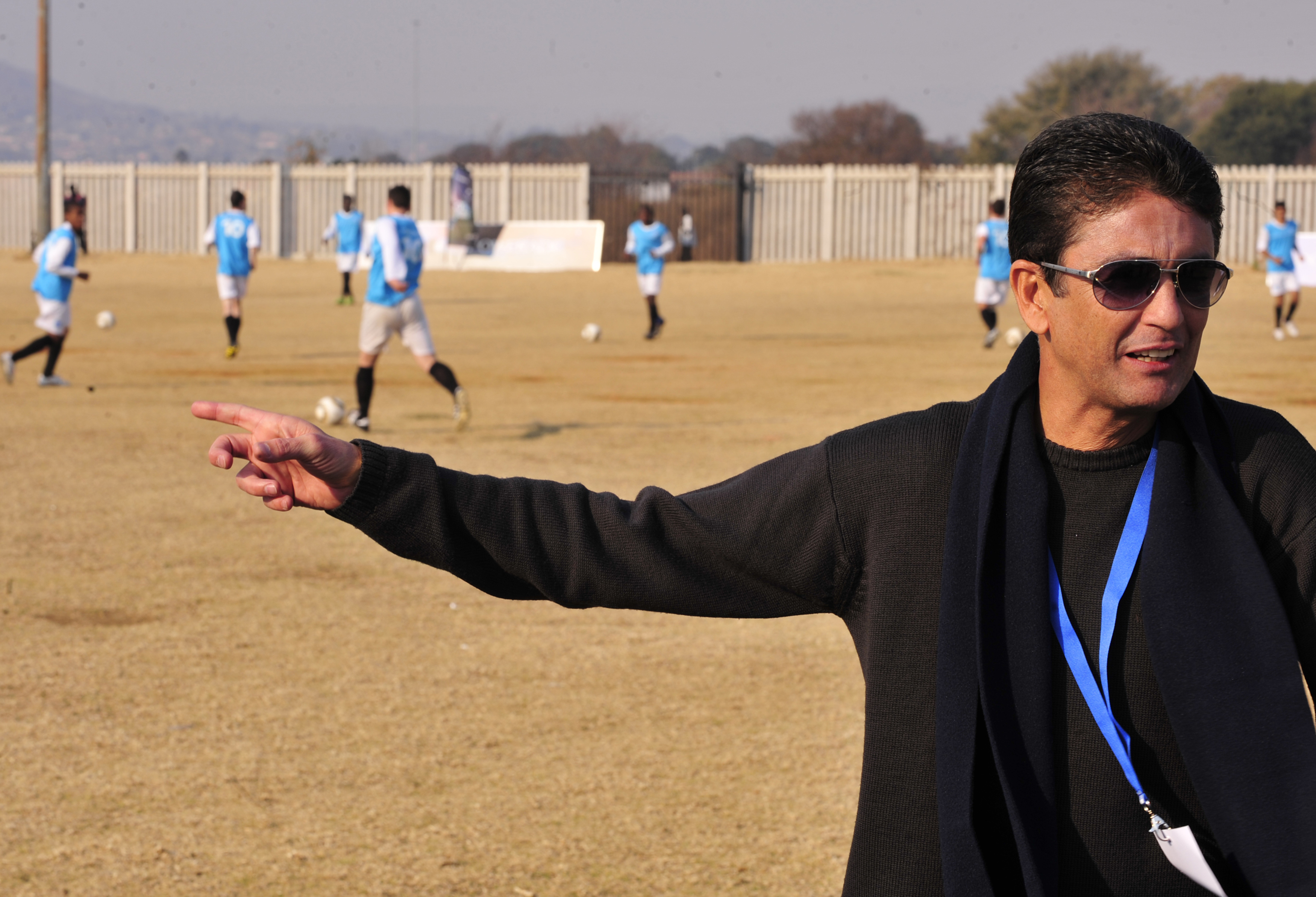 O ex-jogador de futebol, tetracampeão mundial Bebeto, assiste em Pretória (África do Sul) a jogo de futebol de escolinha que prepara crianças e adolescentes por meio de um projeto social.